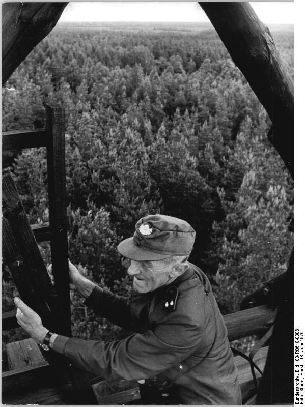 Wensickendorf, Turmwächter ADN-ZB Sturm 18.6.1976-Zum Beitrag: Der Turmwächter im Bergsdorfer Forst - Schutz unserer Wälder vor dem "roten Eichkater". Einhundert hölzerne Leitersprossen führen hinauf zu der kleinen Kanzel von eineinhalb Quadratmeter Fläche in dreißig Meter Höhe, von wo aus Bernhard Lotzy nun seit 1962 vom zeitigen Frühjarhr bis in den Herbst, mit dem Feldstecher bewaffnet, an durchschnittlich 125 Tagen im Jahr den Wald beobachtet, um ihn vor drohender Brandgefahr beschützen zu helfen. Der Turmwächter weiß sehr gut, wie wichtig sein Dienst auf dem Feuerwachturm bei Wensickenforf im Bergsdorfer Forst ist - besonders in einem Jahr wie diesem, mit seinen langanhaltenden Trockenperioden. Zweimal wurde Bernhard Lotzy in den zurückliegenden Jahren als Brandschutzwächter des Staatlichen Forstwirtschaftsbetriebes Oranienburg mit der Auszeichnung als Aktivist geehrt. (Bitte beachten Sie hierzu auch R0618-304N und 305N)